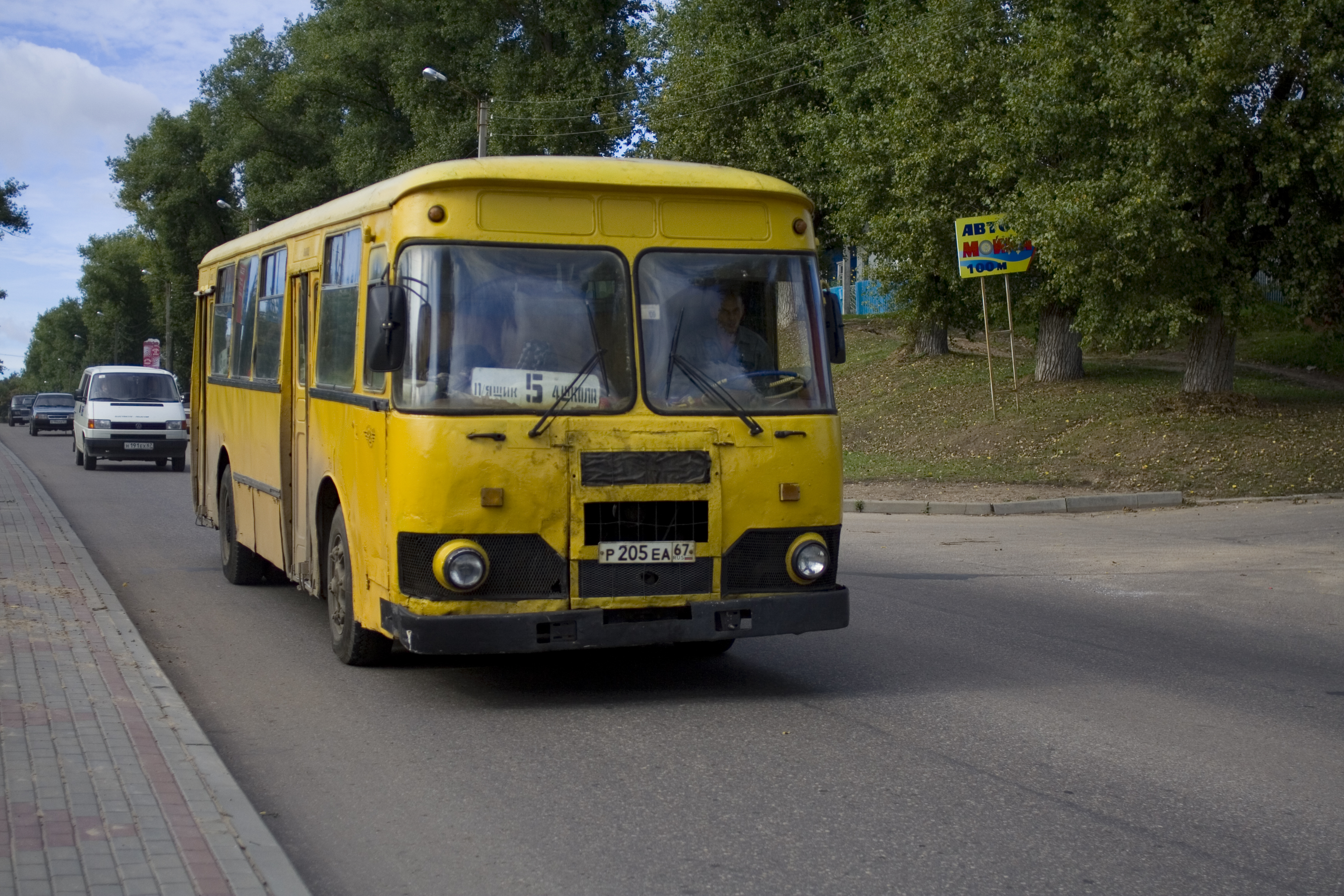 ЛиАЗ-677М в Рославле